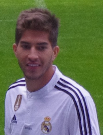 Präsentation von Lucas Silva im Santiago Bernabeu am 26. Januar 2015